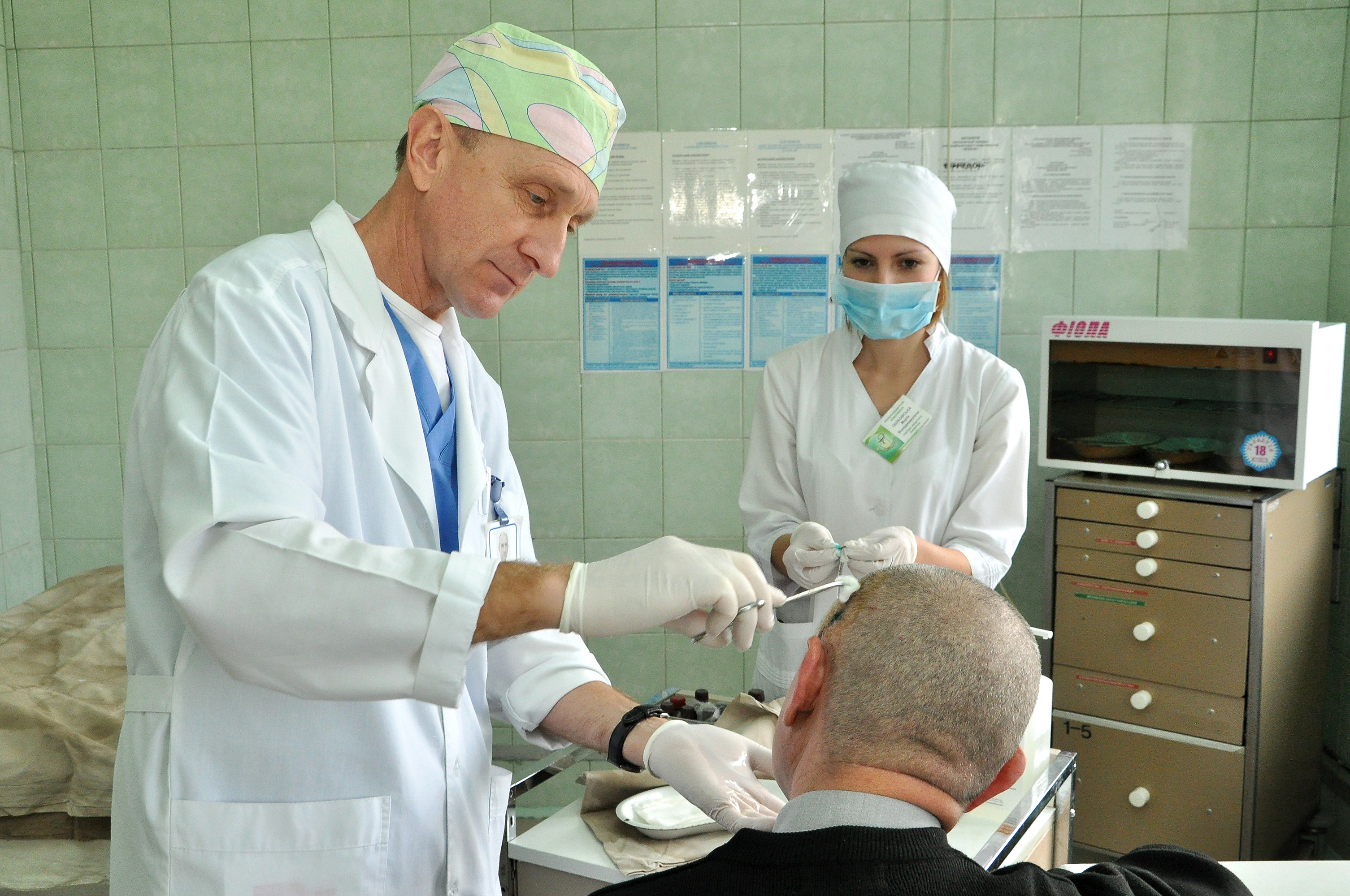 Український вчений у галузі медицини, нейрохірург Петро Гудак та медична сестра Марія Галковська оглядають пацієнта в нейрохірургічному відділенні Тернопільської обласної лікарні.